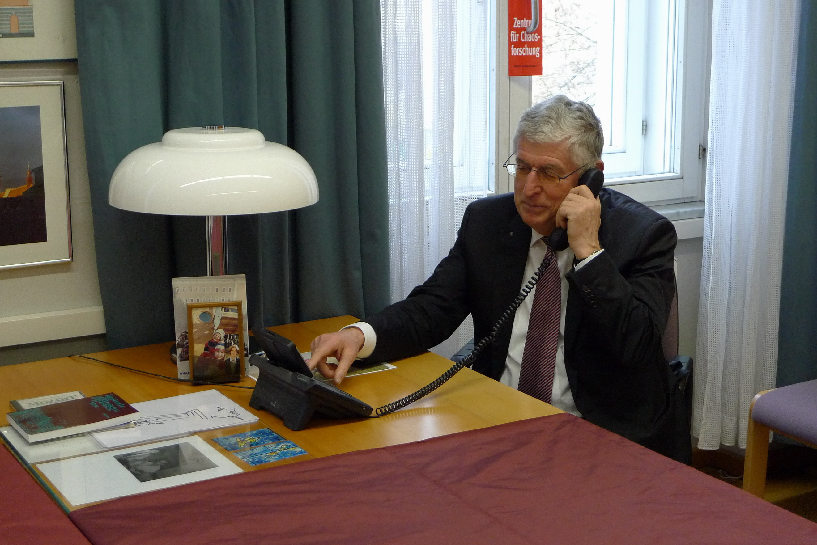 Josef Wilhelm 30.11.2010; eigene Aufnahme des Autors; die schriftliche Genehmigung der dargestellten Person zur Veröffentlichung des Bildes liegt dem Autor vor